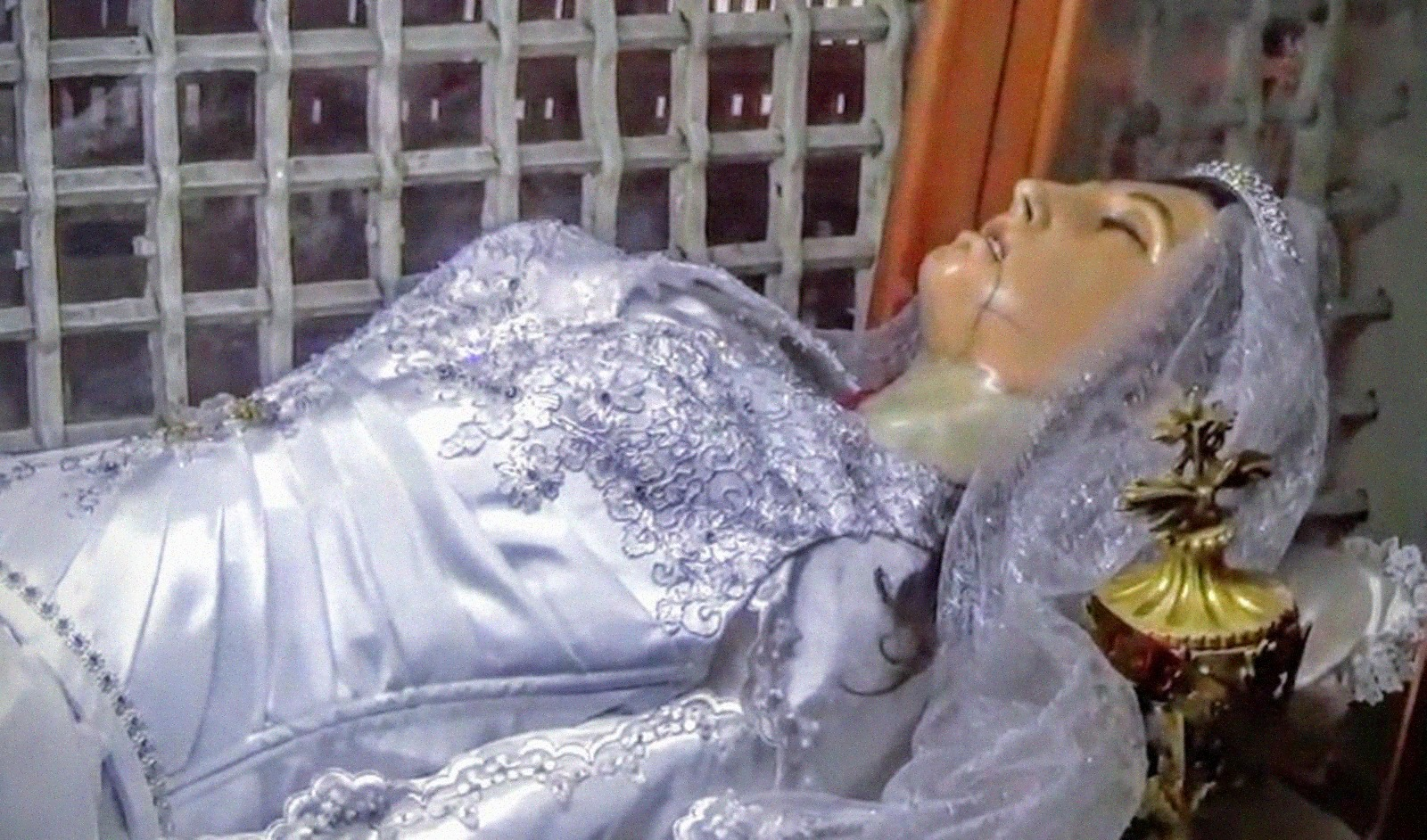 Reliquias de Santa Celeste en la Iglesia de Santa Teresa la Nueva (México).